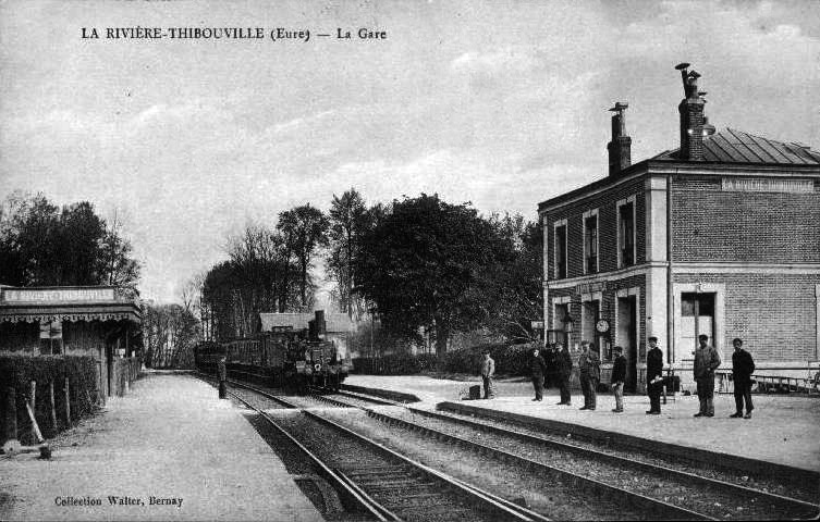 La gare de La Rivière-Thibouville, avec son bâtiment voyageurs, et son abri de quai. Un train arrive de Brionne, vers 1900.